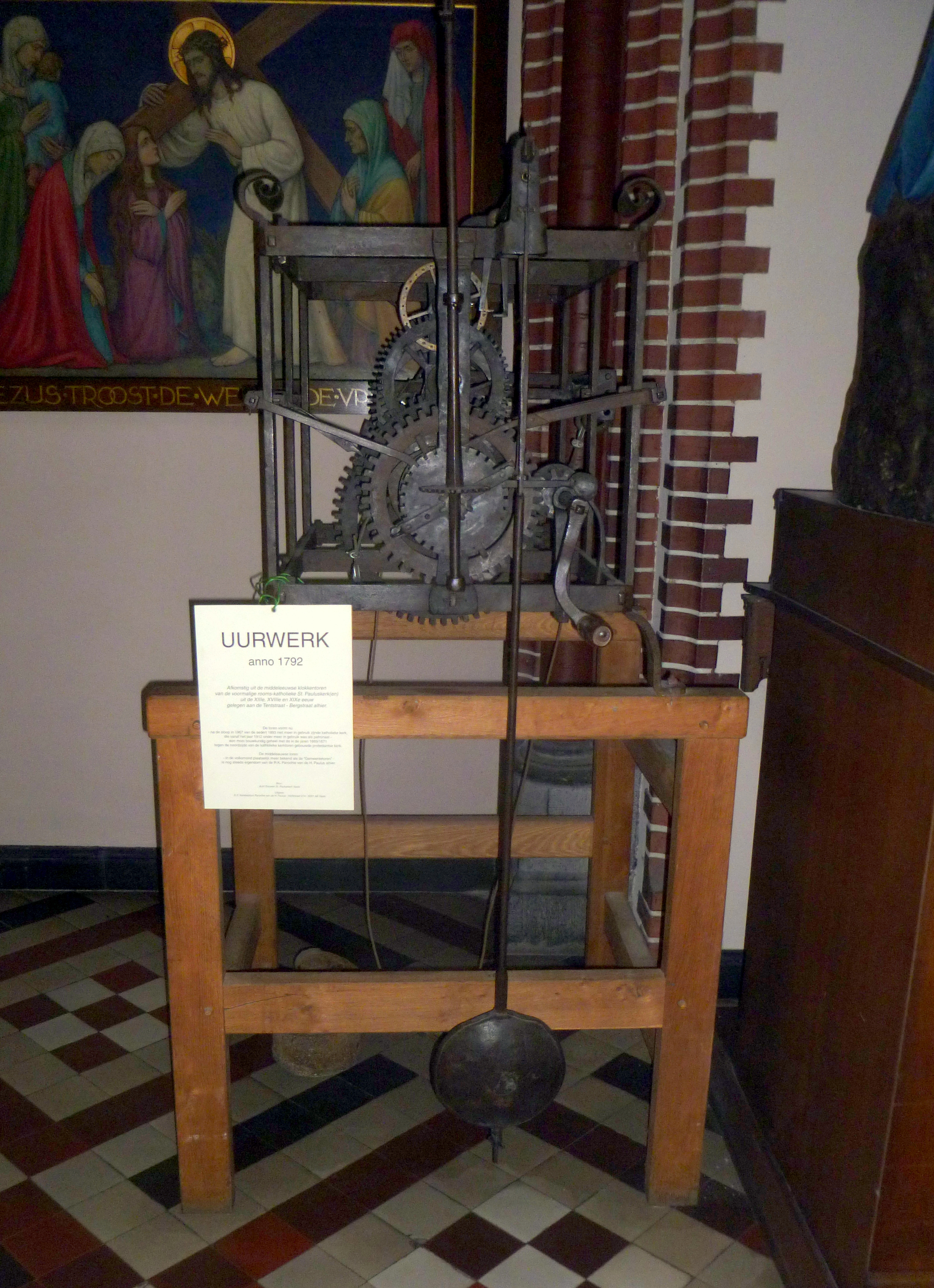 mechanisches Uhrwerk von 1792 aus dem Glockenturm der ehemaligen St. Paulus-Kerk in Vaals, jetzt ausgestellt in der neuen Kirche